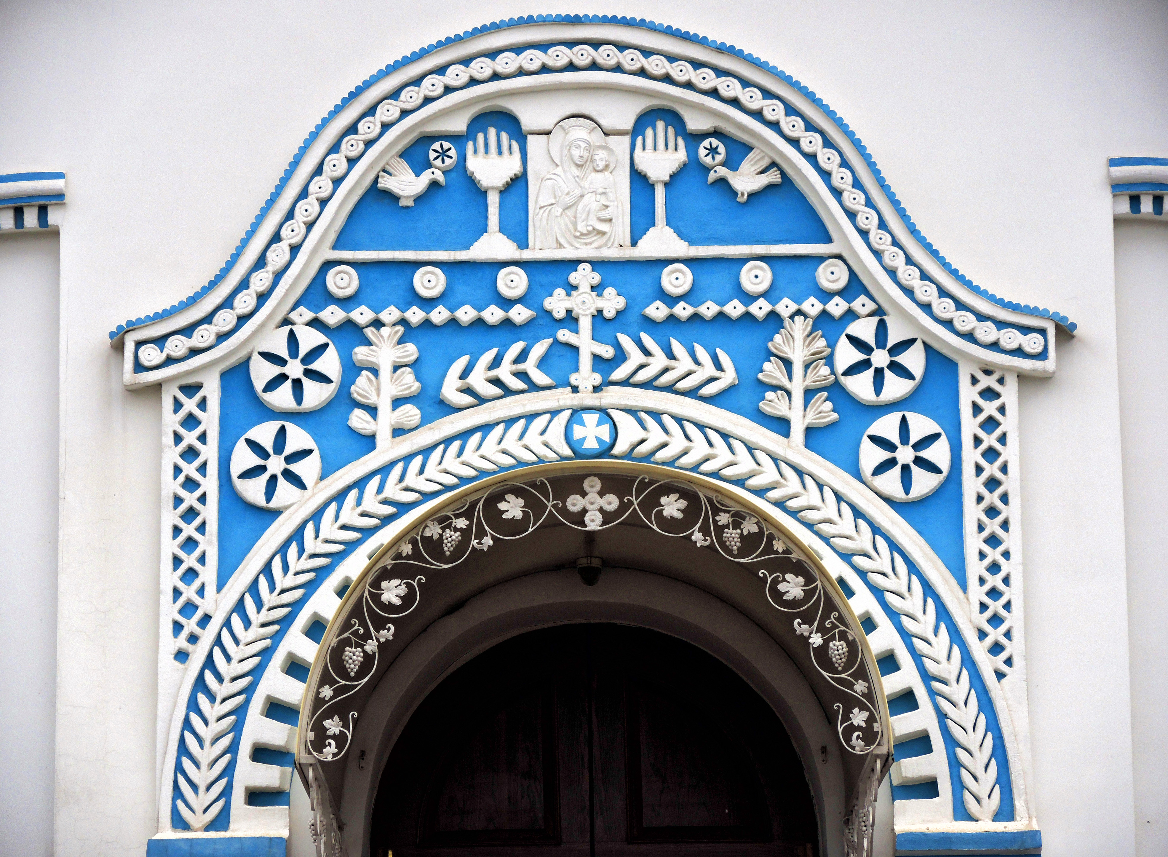 Монастырь Троицко-Алексеевский женский: улица Неклиновская, 3 (Северный жилой монастырь), Ростов-на-Дону, Ростовская область